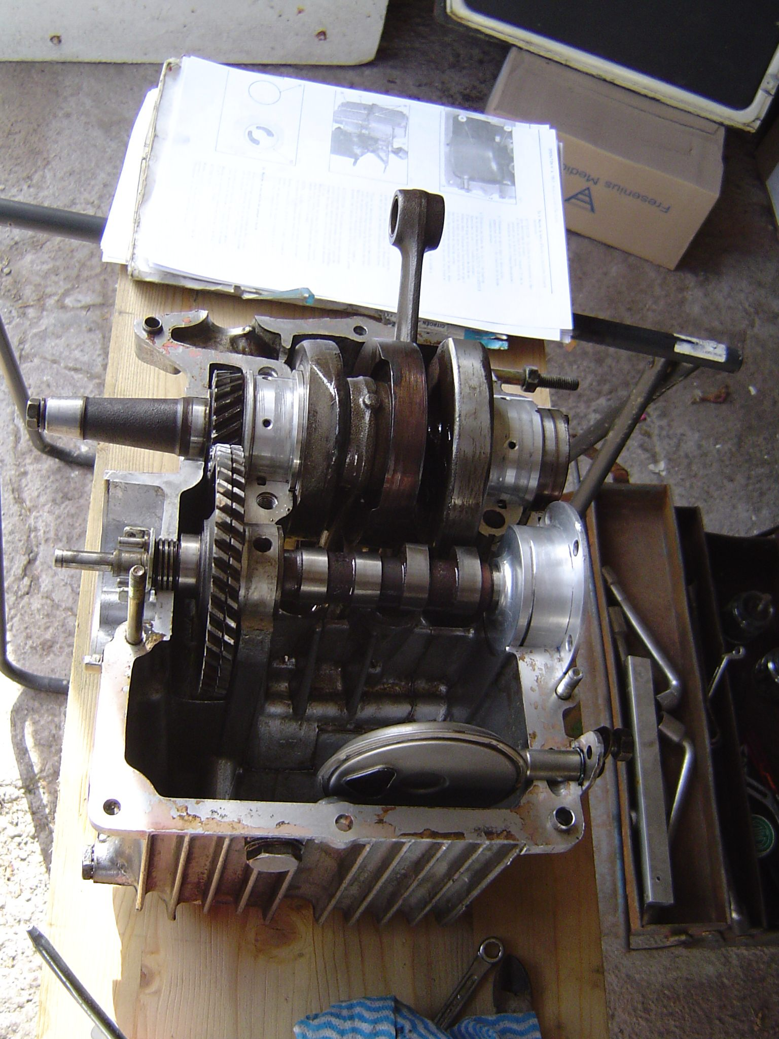 Aperçu du moteur de la 2CV, carter ouvert: On distingue nettement le vilebrequin embiellé en haut, entrainant par roue dentée l'arbre à cames. Au fond du carter, la crépine d'aspiration d'huile